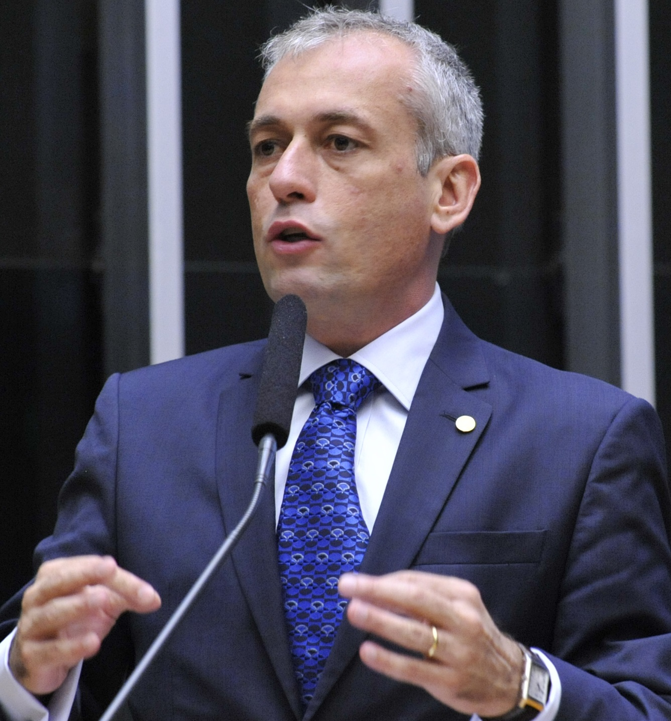 João Paulo Kleinübing em abril de 2016.